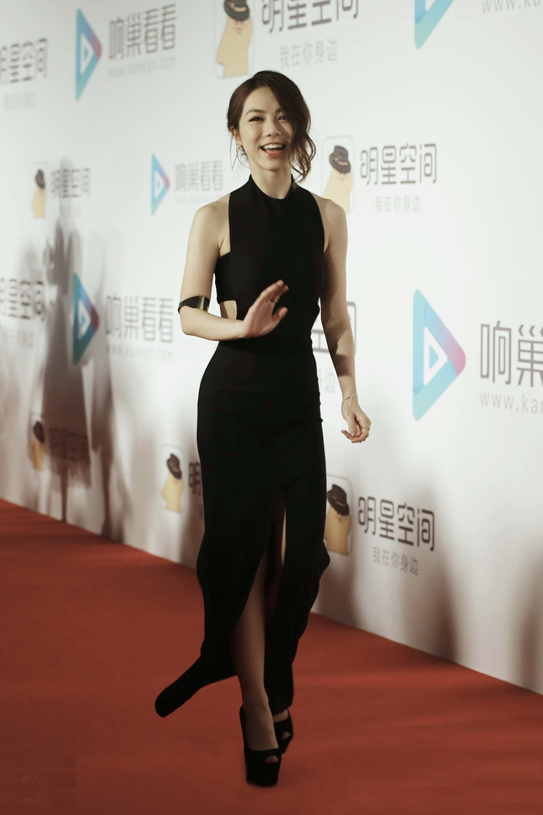 明星空间 红毯